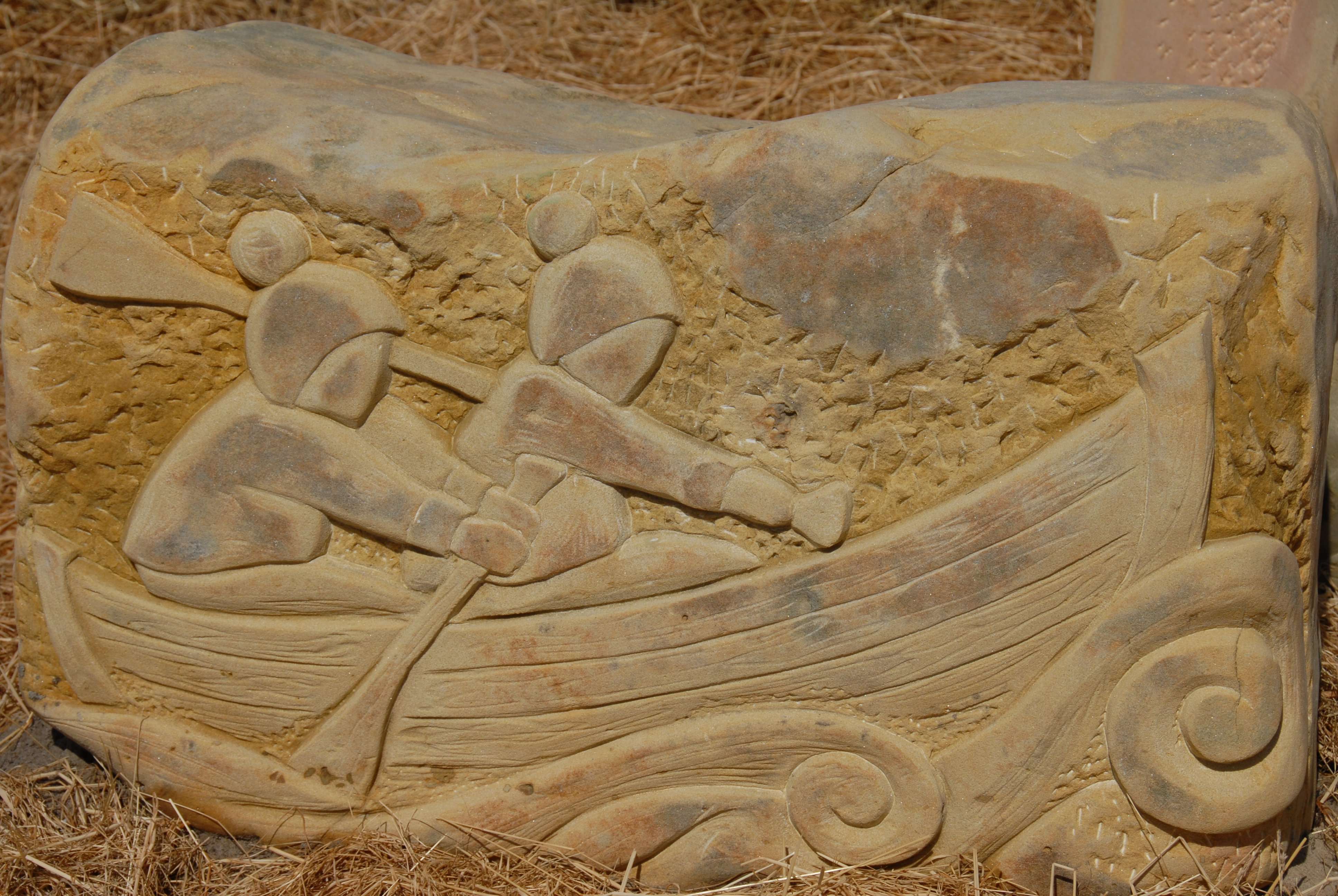 Tjark Evers Denkmal Baltrum - Detail